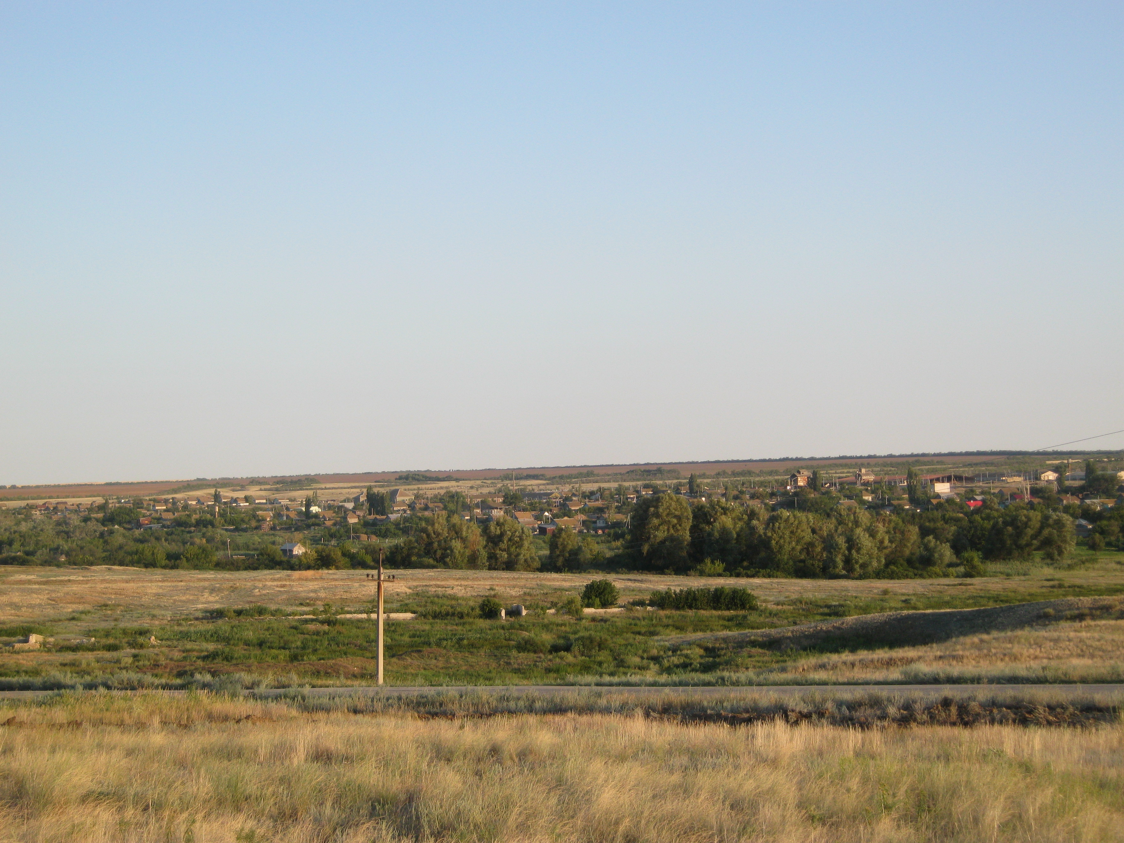 Вид села Малая Ивановка